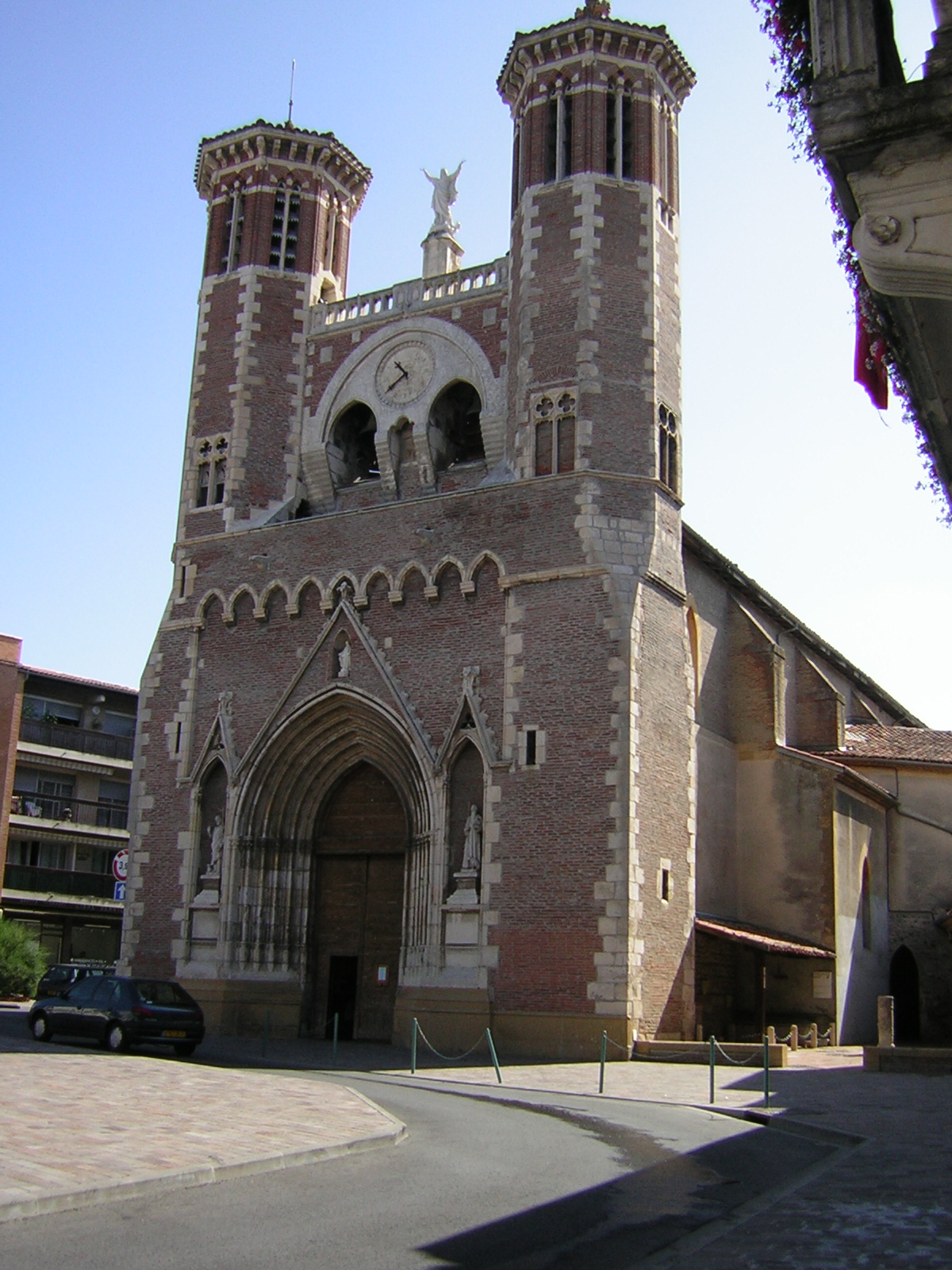 Église de l'Assomption de Cazères (Haute-Garonne, France).